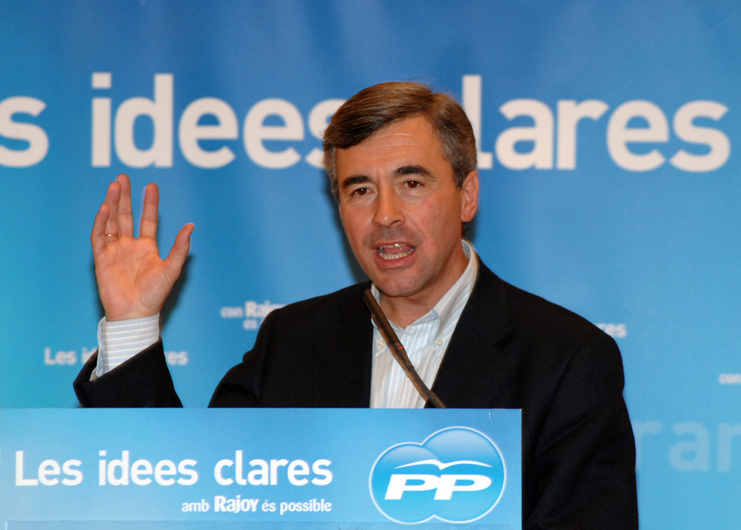 Ángel Acebes en un mitin del Partido Popular de Cataluña.